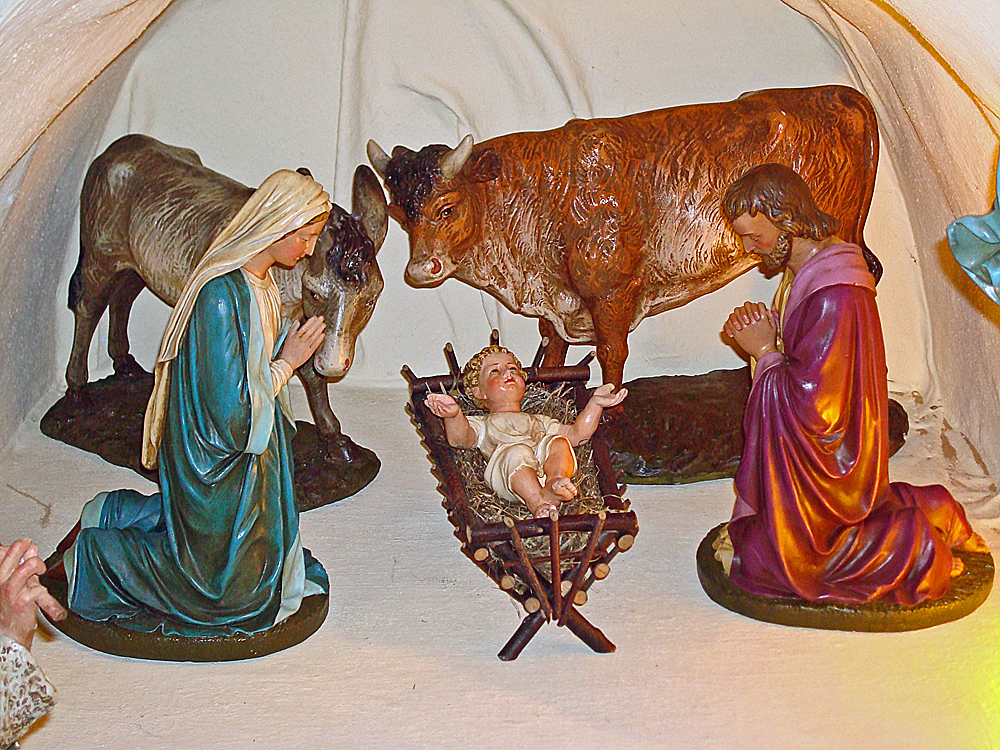 Weihnachtskrippe (um 1920) in der Gütersloher Martin-Luther-Kirche